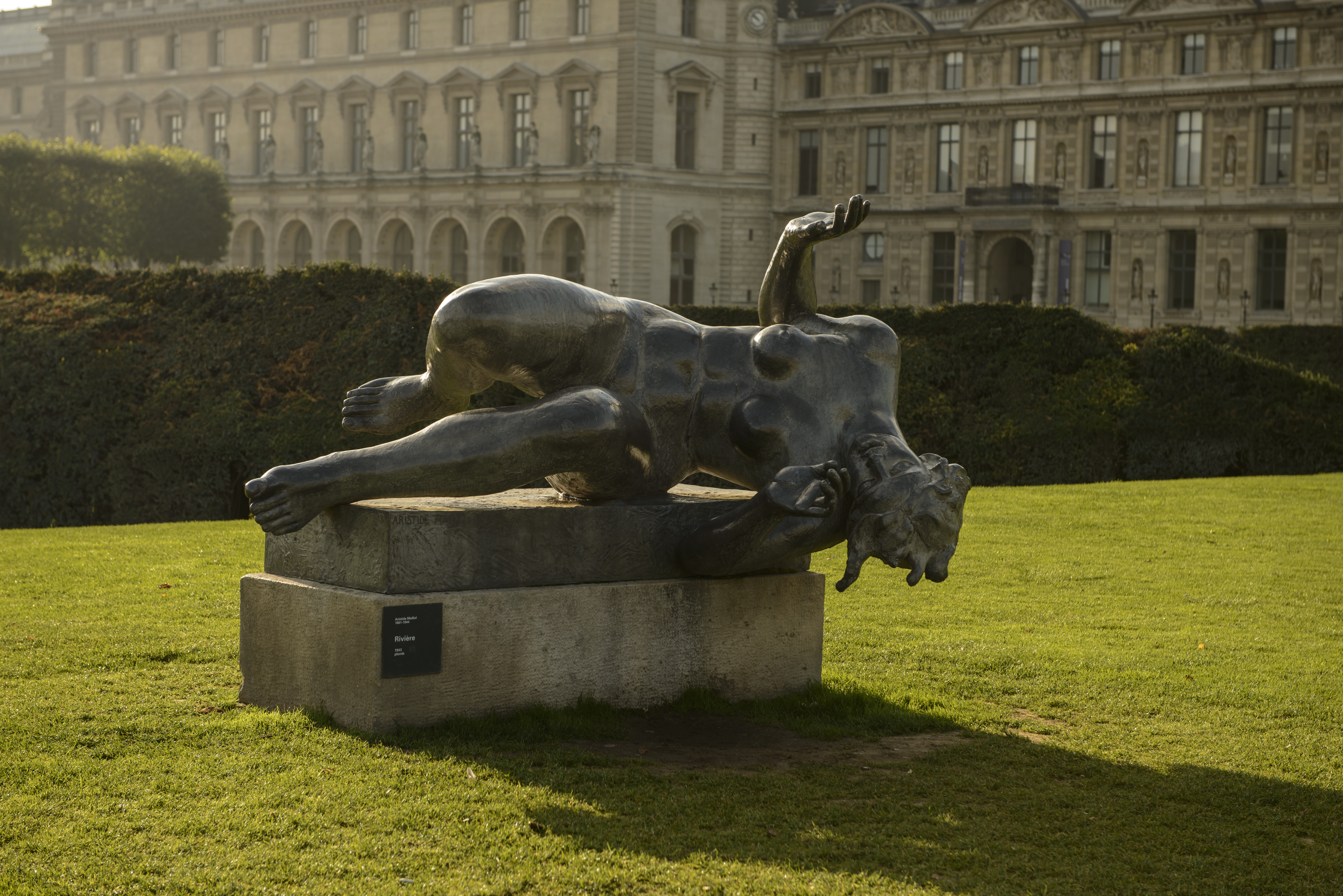 Rivière by Aristide Maillol, Jardins des Tuileries, Paris, France.